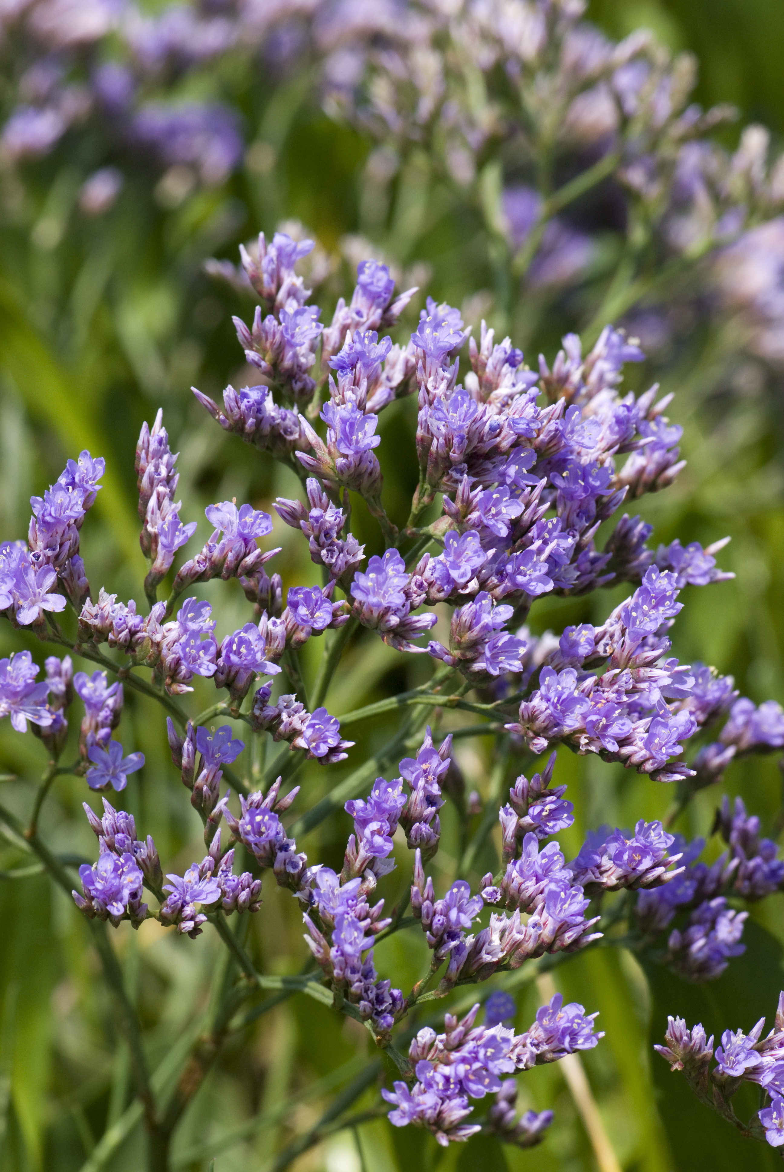 Limonium vulgare Baie d'Authie (Somme), France